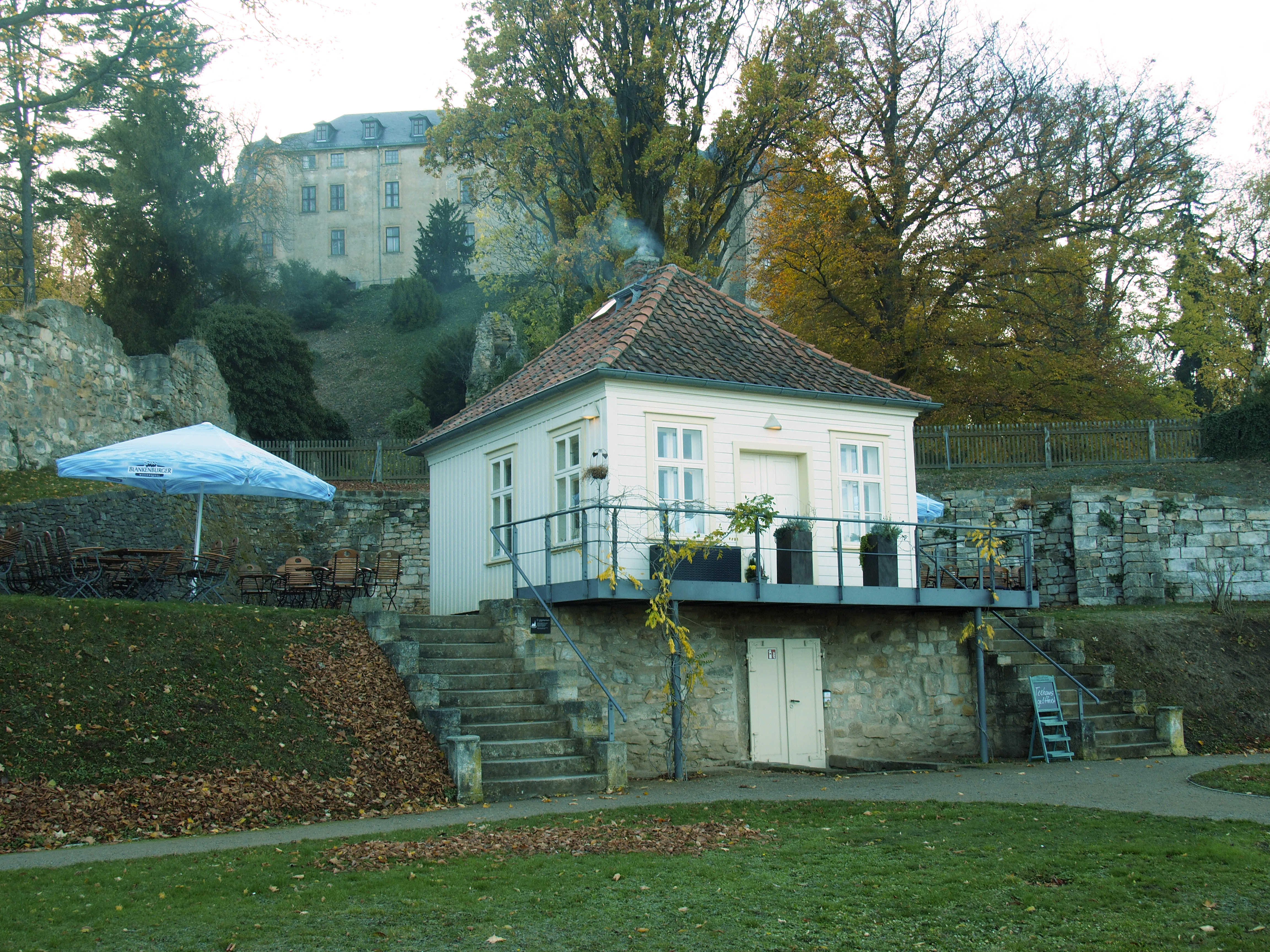 Teehaus im Schlossgarten Blankenburg (Harz)